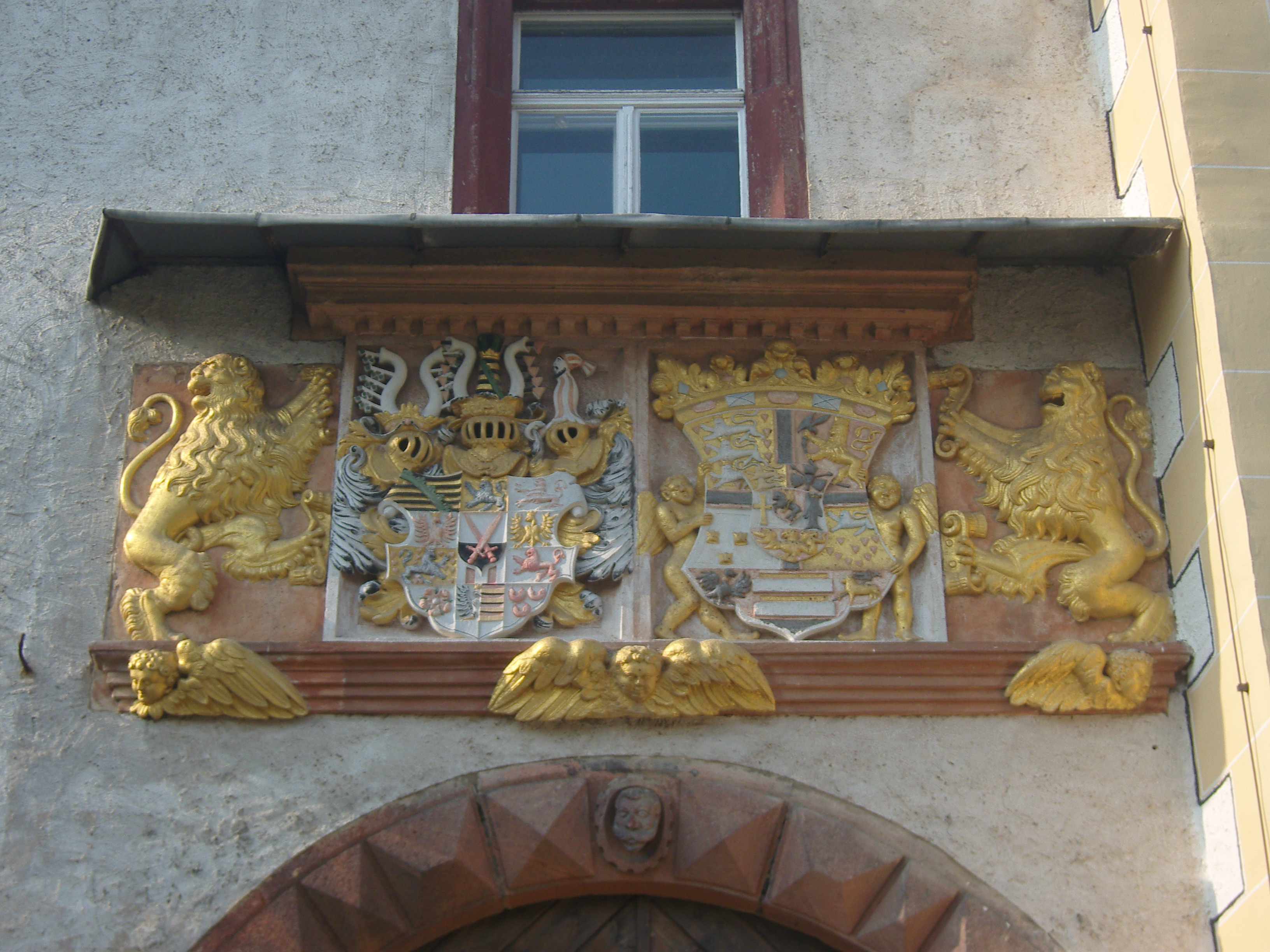 Schloss Colditz - Wappen über dem Eingang: Allianzwappen Kurfürst August von Sachsen (1526-1586) und seiner Frau Anna von Dänemark (1532–1585)